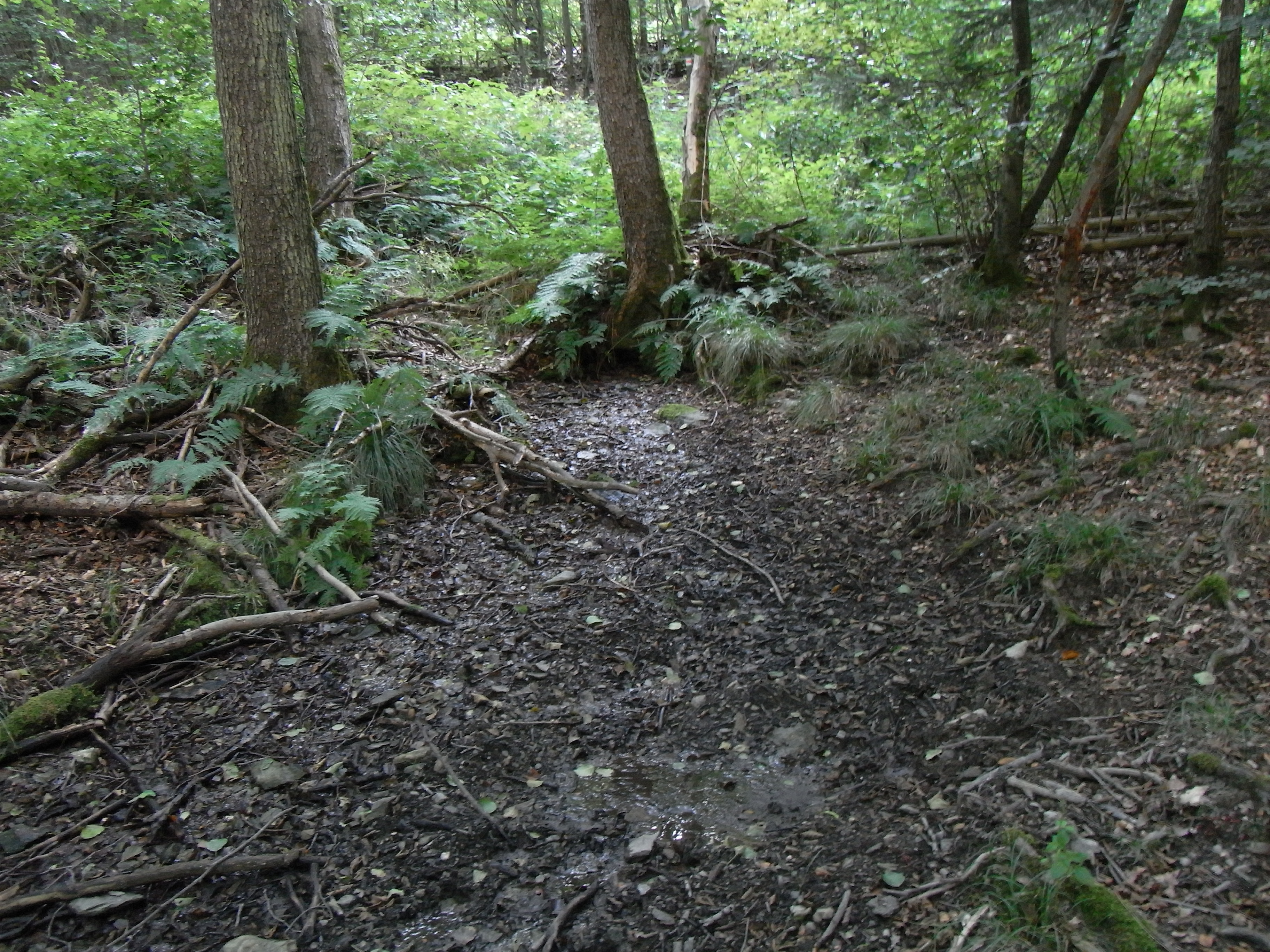 Die Quelle des westlichen Quellasts vom Fauerbach unterhalb Gickel und Hesselberg auf 456 Metern Höhe